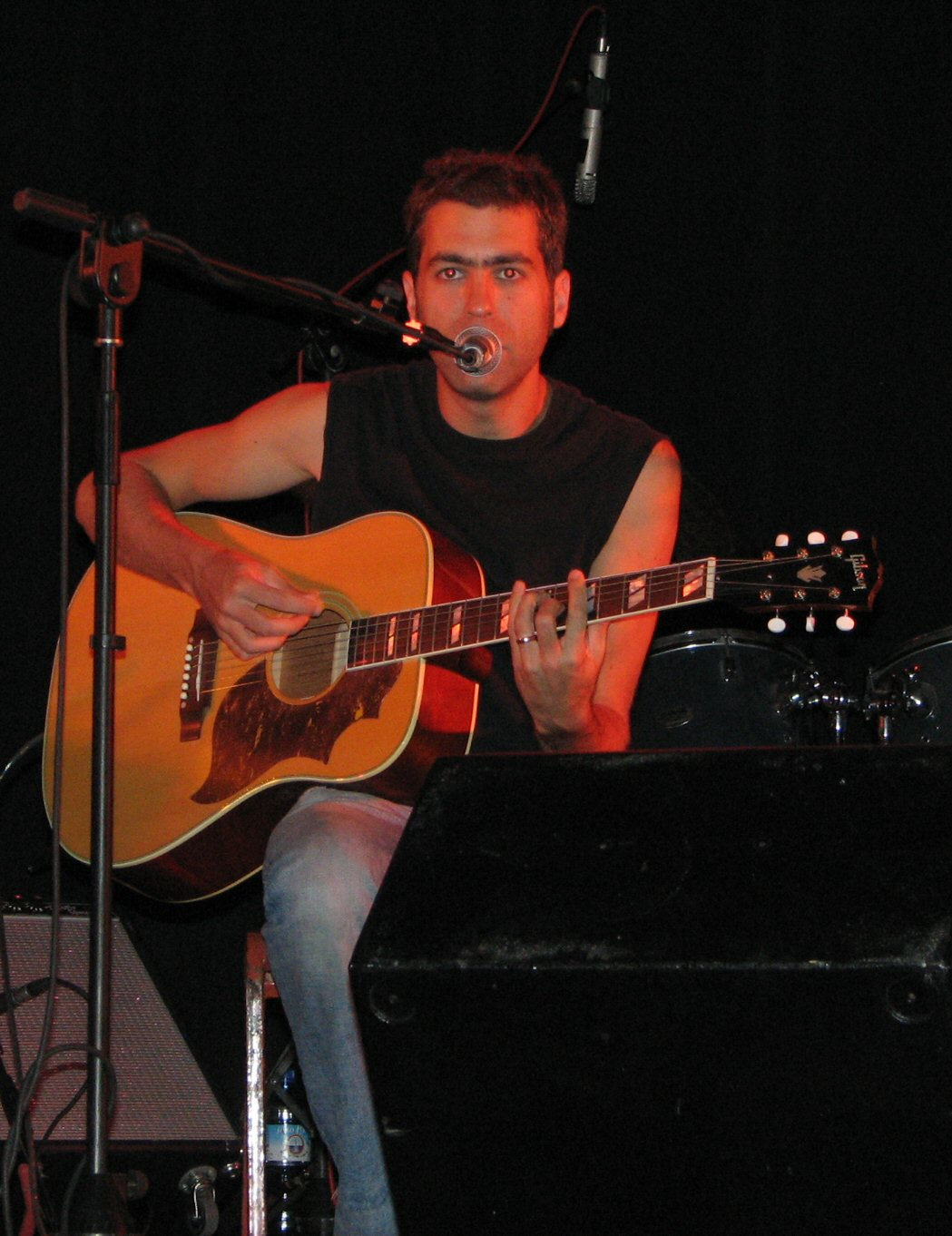 יהלי סובול בהופעה בכברי, 5 ביוני 2006. צולם על ידי חי.